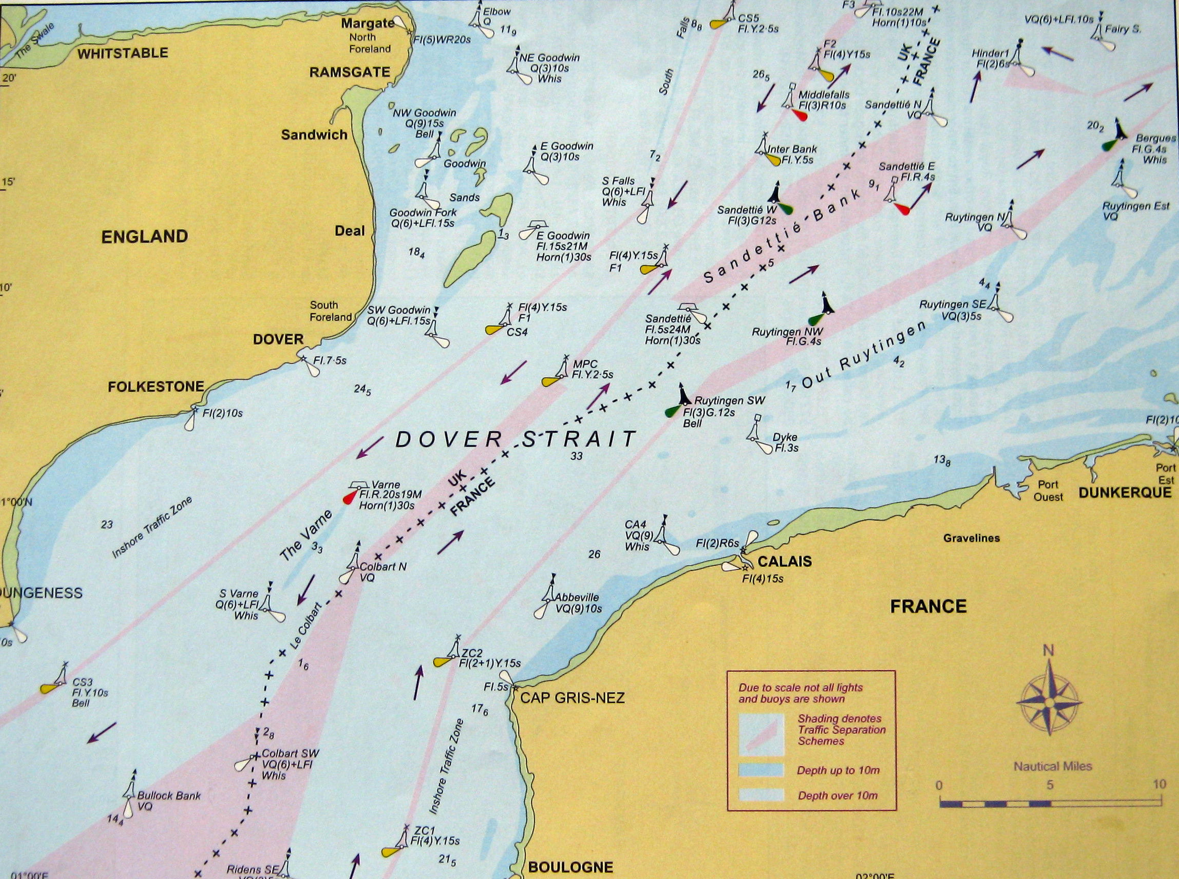 Verkeersscheidingsstelsel tussen Dover en Calais